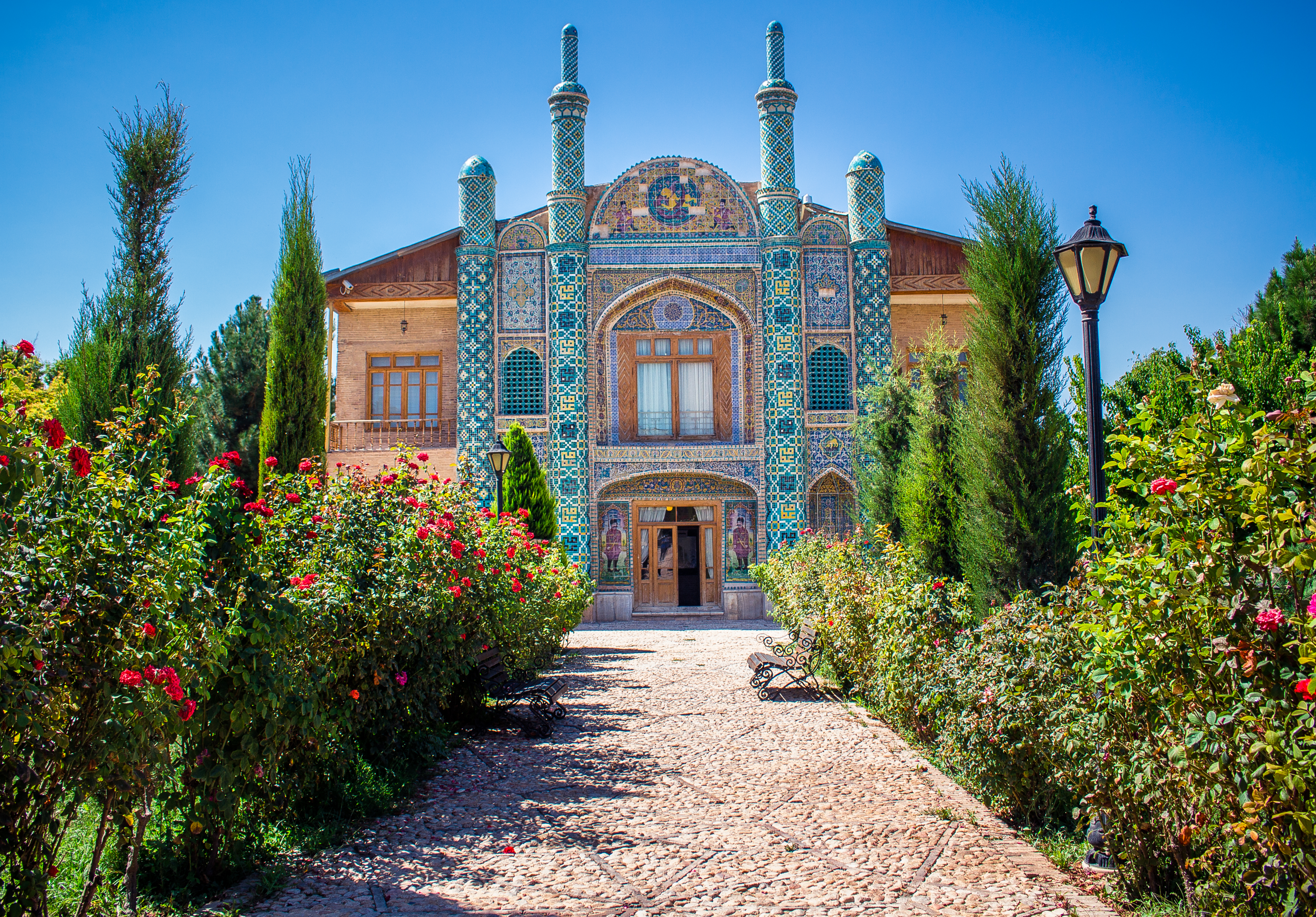 عمارت آینه‌خانه مفخم